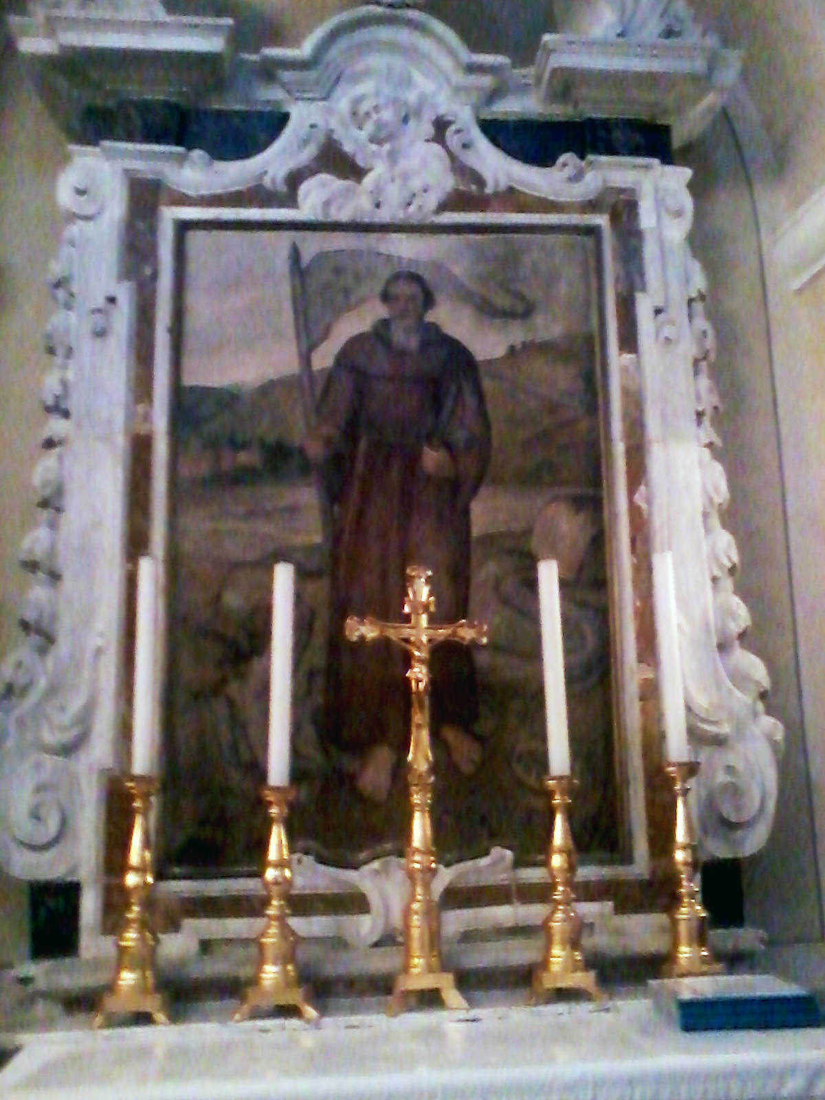 Daniele Romei, Chiesa di San Michele Arcangelo, Minucciano Lucca